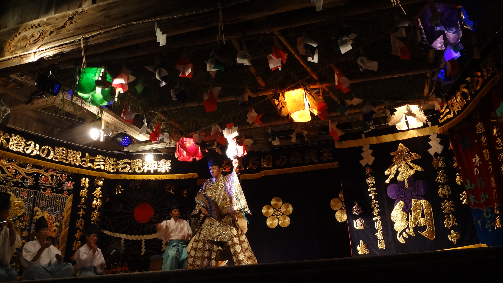 石見神楽/Iwami-Kagura、演目は"塩祓"(しおはらい)/Program Title:"Shio-Harai"。松原神楽社中（島根県浜田市）